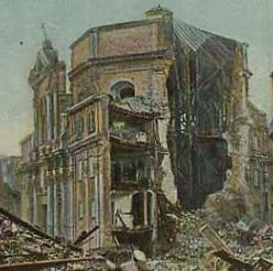 La Chiesa delle Anime del Purgatorio, crollata nel terremoto di Messina del 1908.